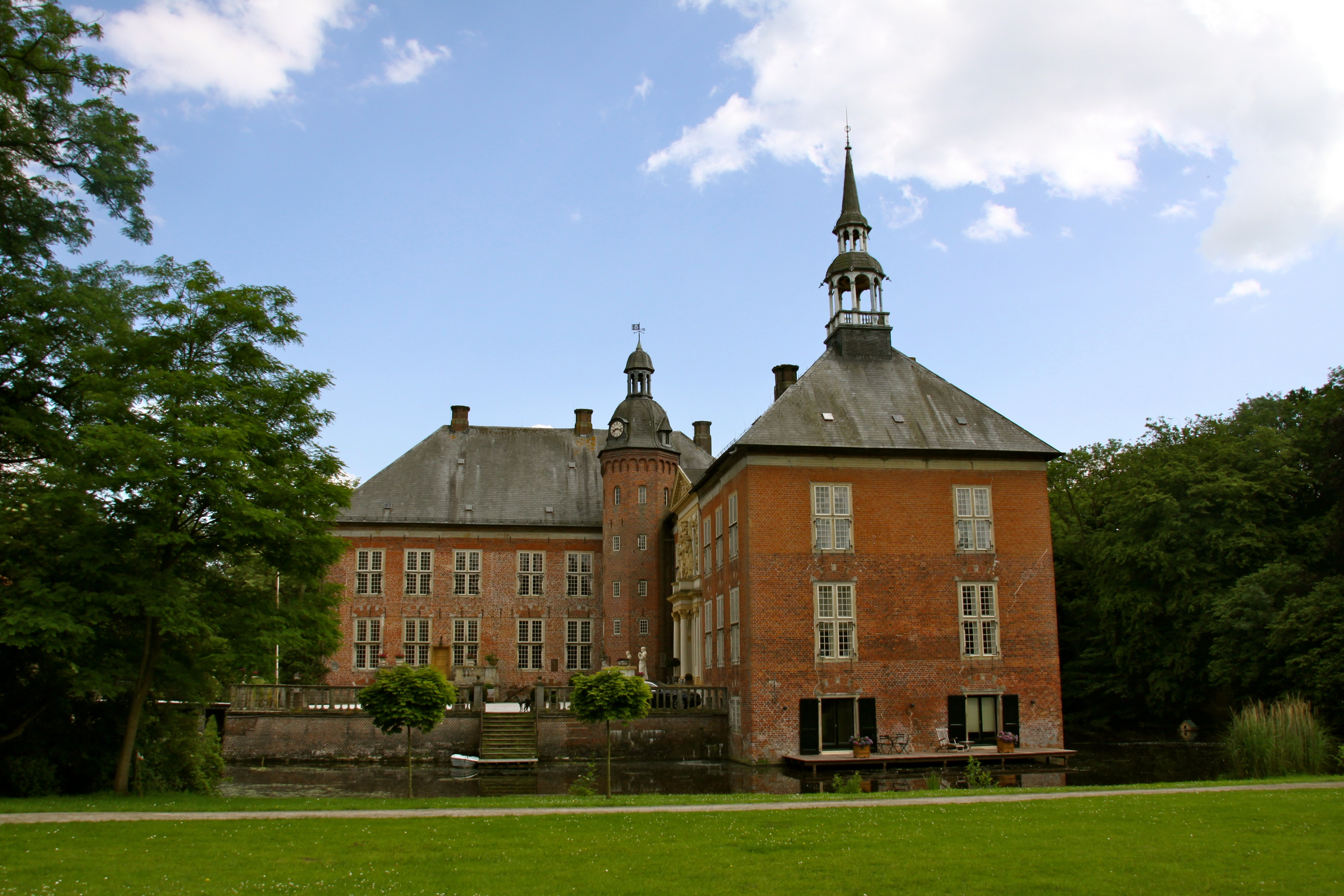 Schloss Gödens Ansicht vom Garten